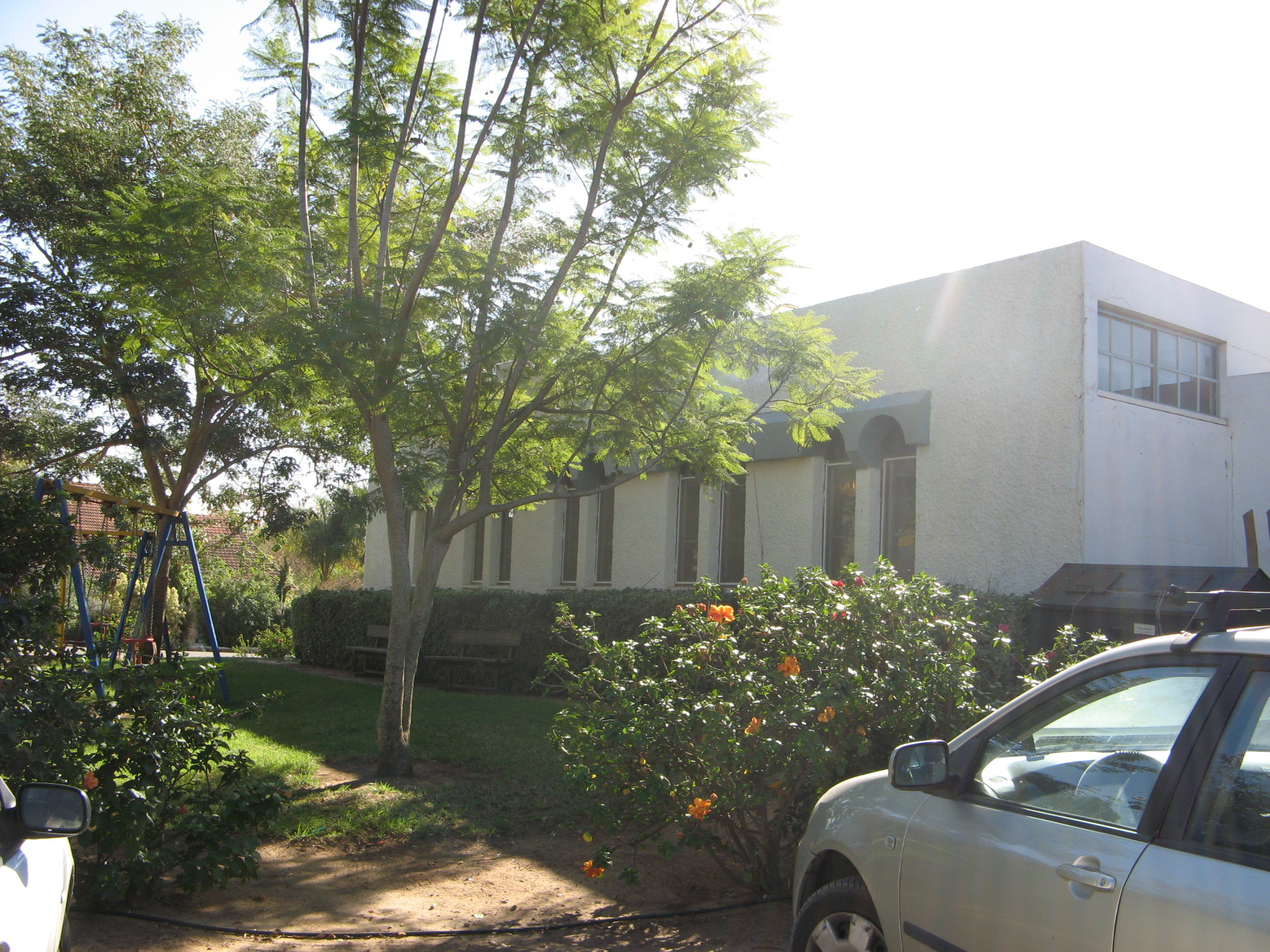 בית הכנסת בכפר פינס